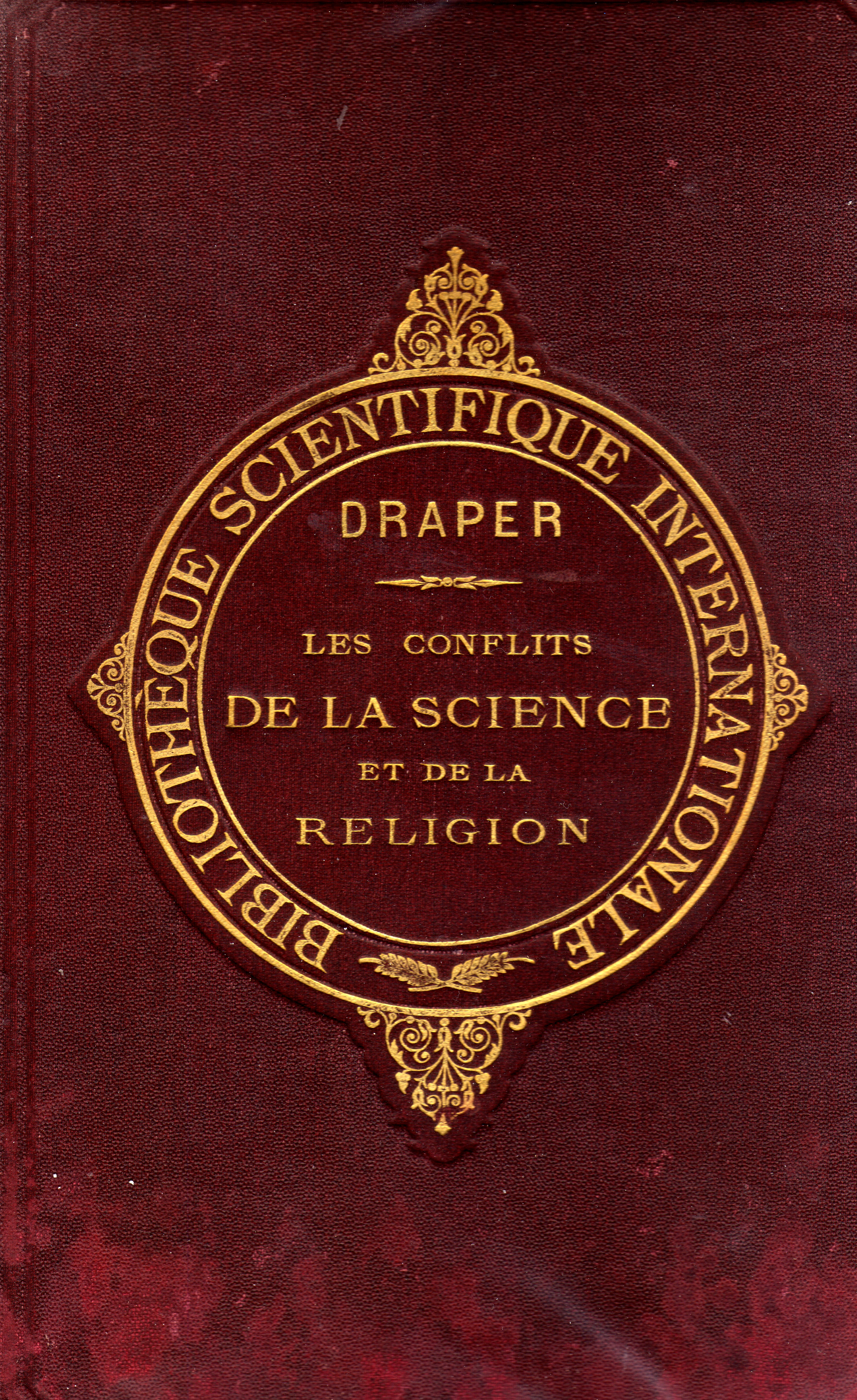 Couverture du livre de John William Draper, "Les conflits de la science et de la religion", Félix Alcan éditeur, Paris, 1903.